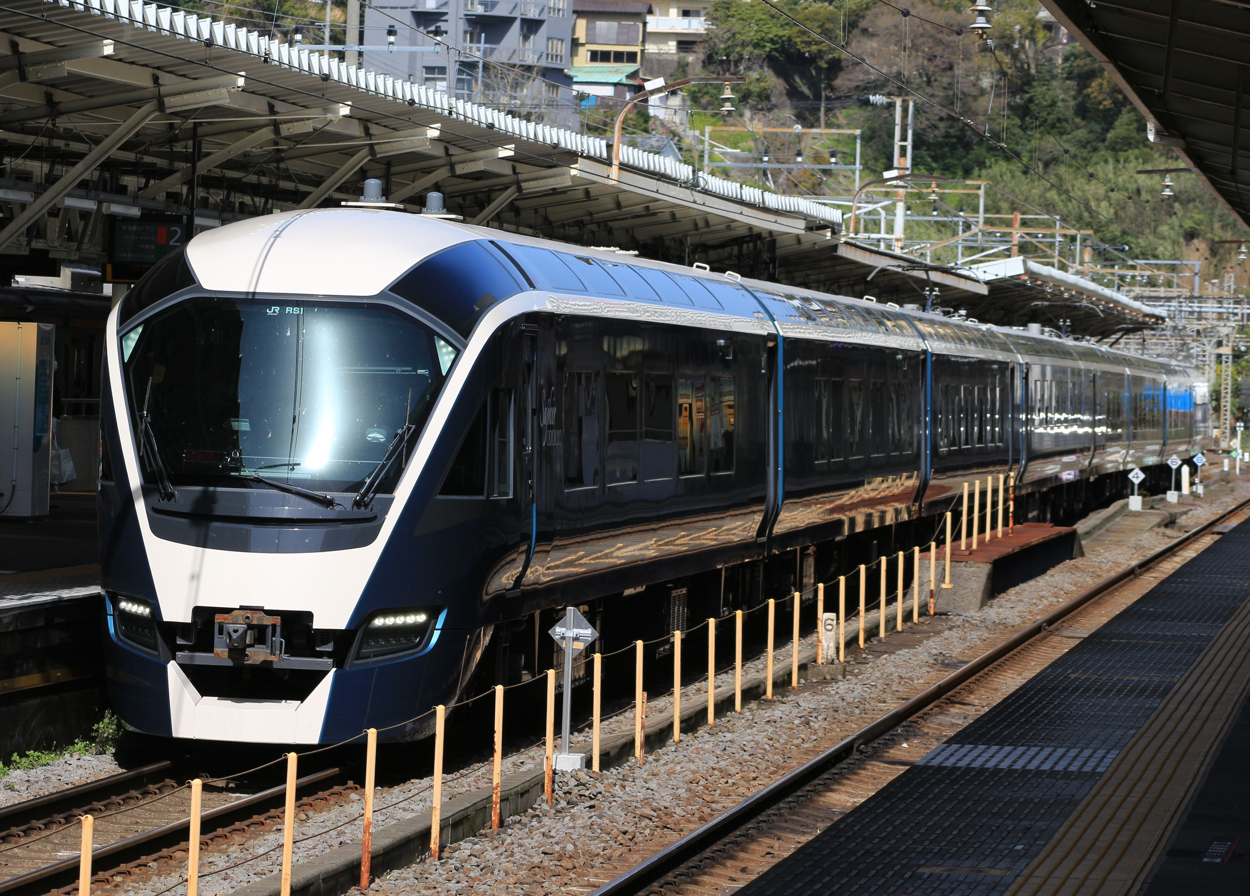 E261系 サーフィル踊り子 熱海駅